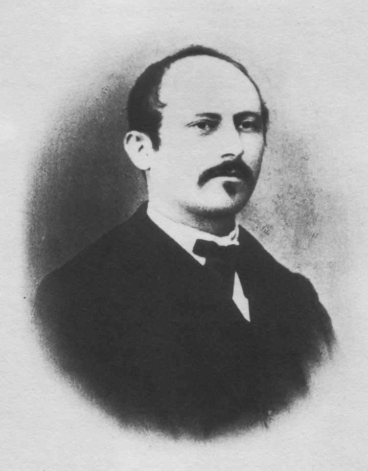 Fotografia di Alessandro Dorna